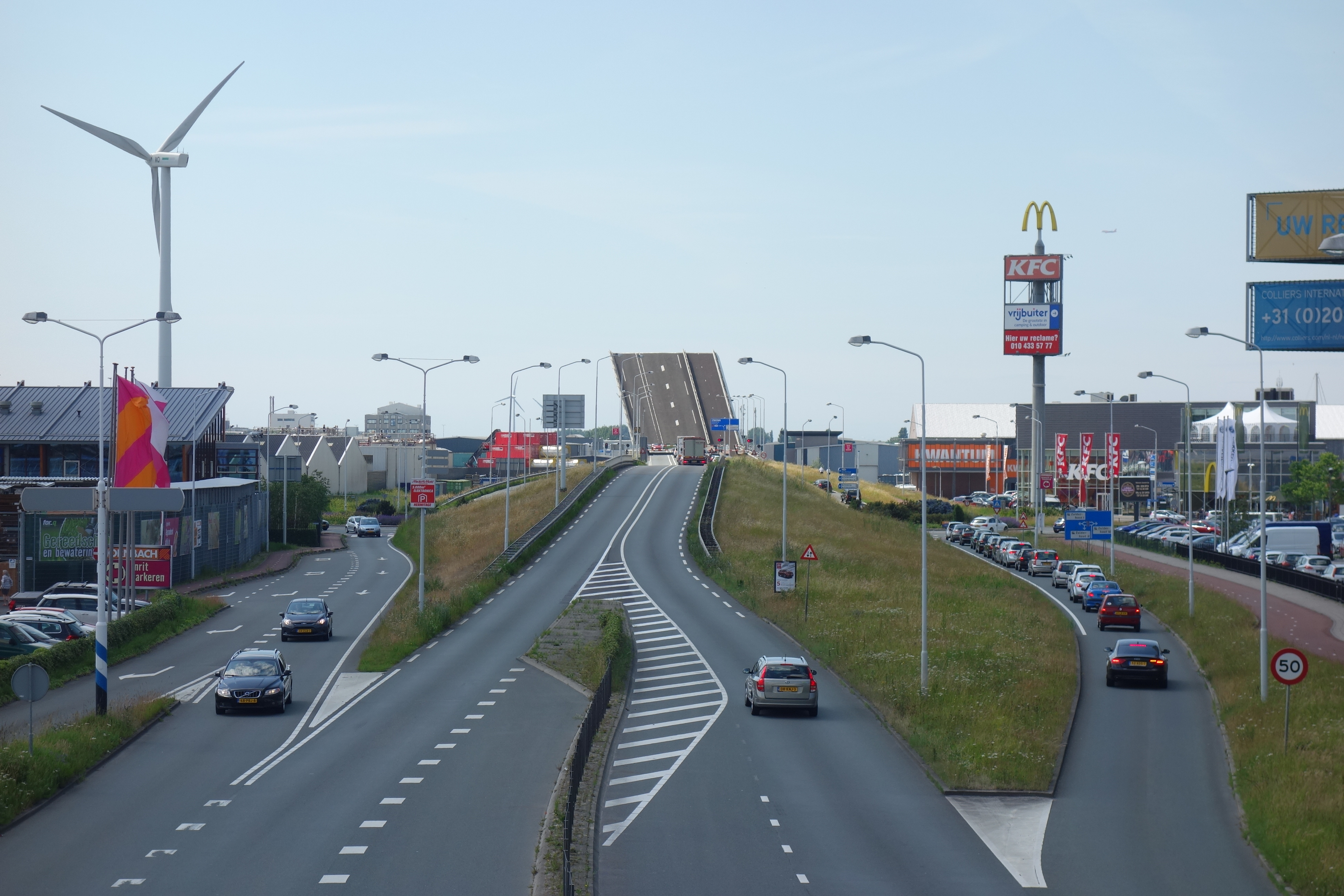 S150 in Zaandam ter hoogte van de woonboulevard in Zuiderhout. Op de achtergrond staat de